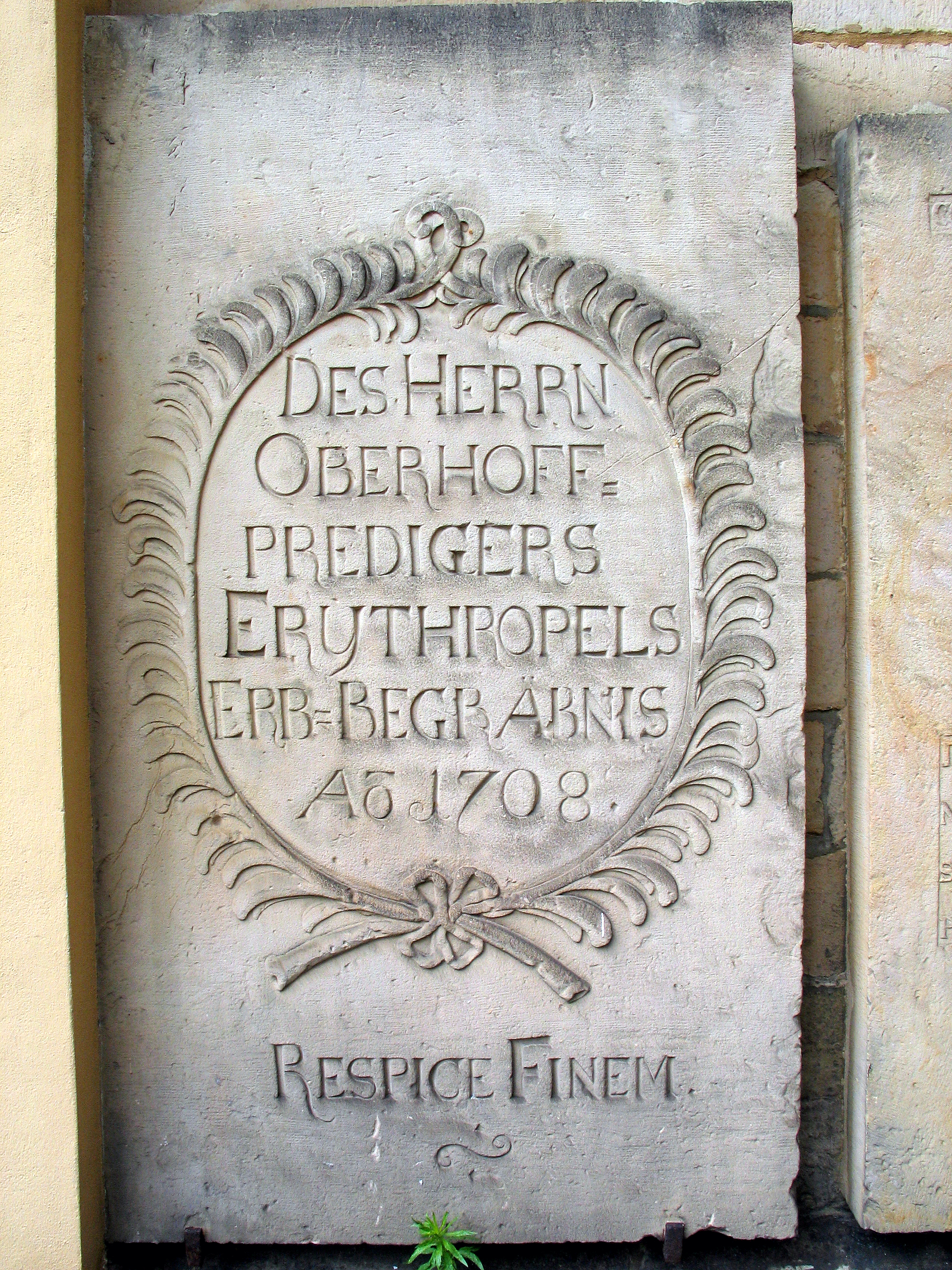 Sandsteinplatte an der Aussenwand der Neustädter Hof- und Stadtkirche St. Johannis des 1708 erworbenen Erbbegräbnisses des Oberhofpredigers David Ruprecht Erythropel (1653-1732), der in der Kirche beigesetzt wurde. Die Inschrift "Respice Finem" lautet übersetzt "Bedenke das Ende" ...